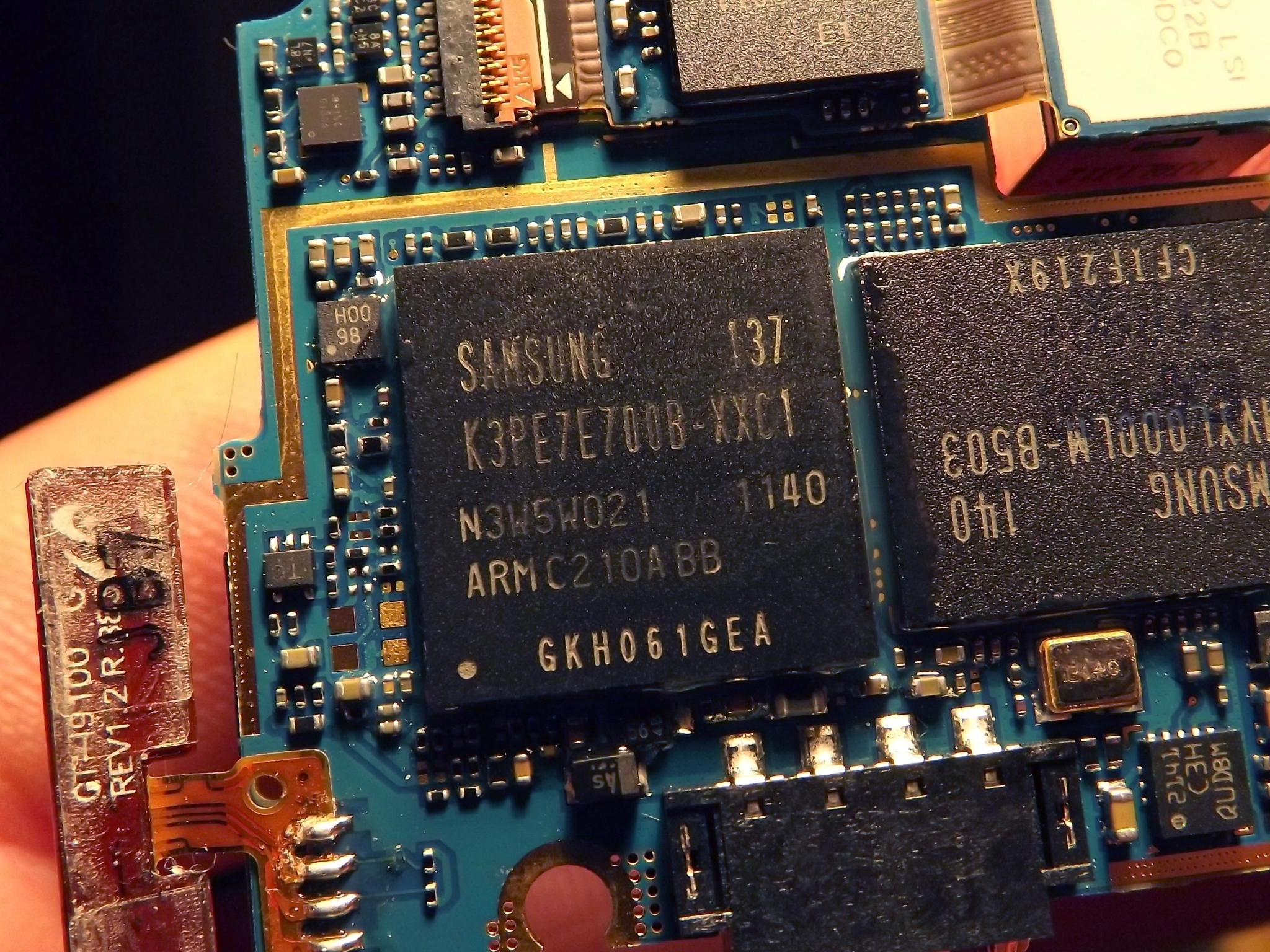 Samsung Exynos 4210 Dualcore-CPU des Samsung Galaxy SII I9100 mit 2x1,2 GHz (in der Bildmitte, daneben der 16GB-Flashspeicher). Foto wurde mit bearbeitet.